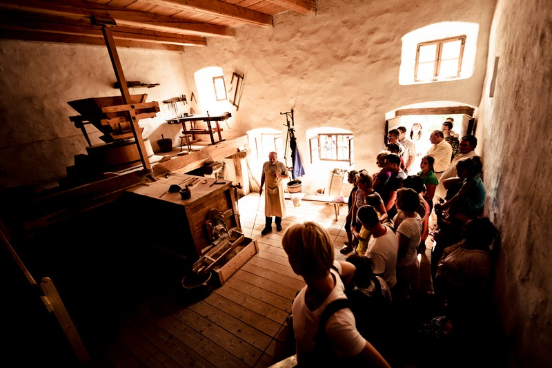 Szentendrei Skanzen, Nyírádi vízimalom